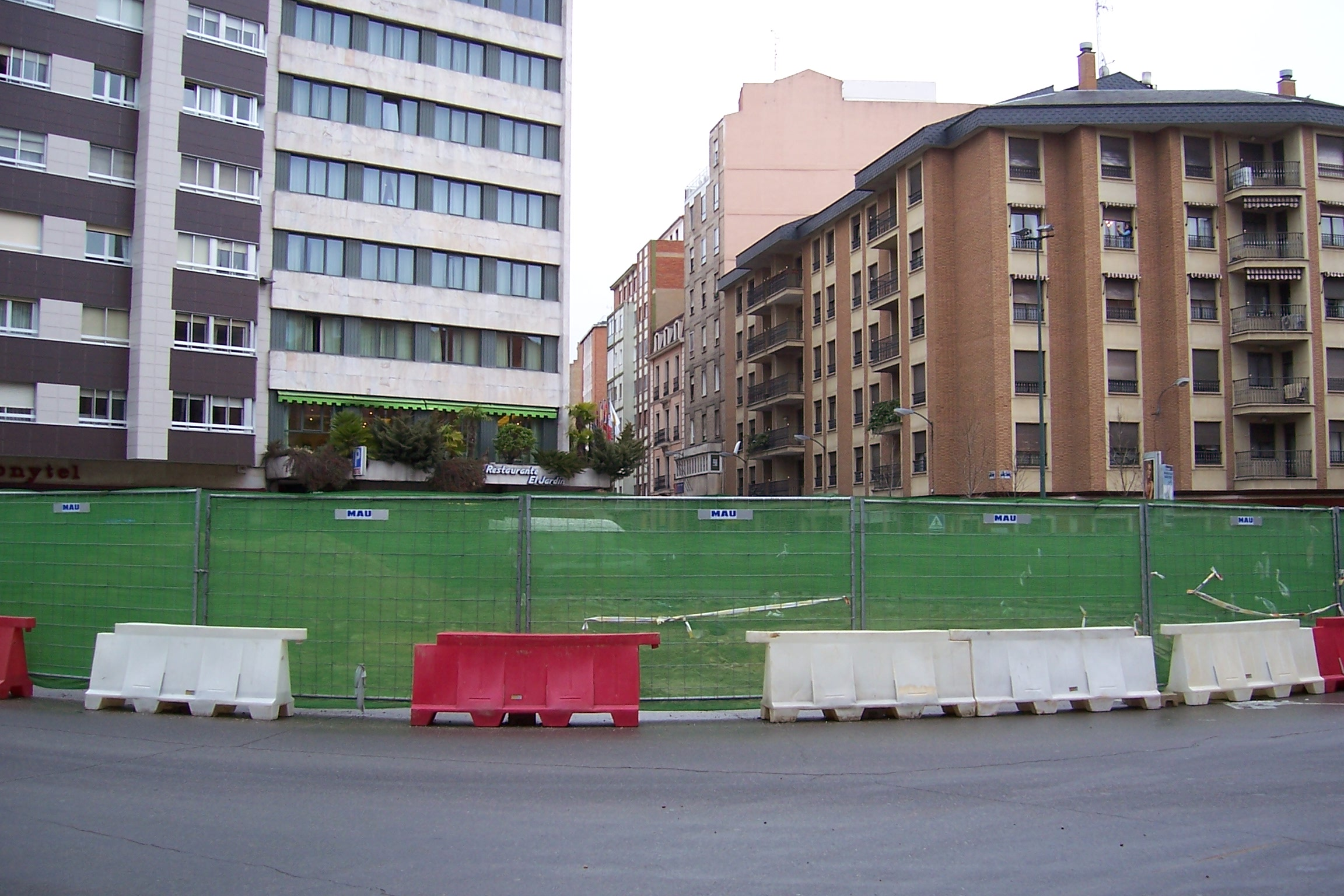 Plaza de San Miguel en Valladolid (España), durante las obras del 2009. Se hicieron excavaciones arqueológicas para encontrar restos de la antigua iglesia de San Miguel.